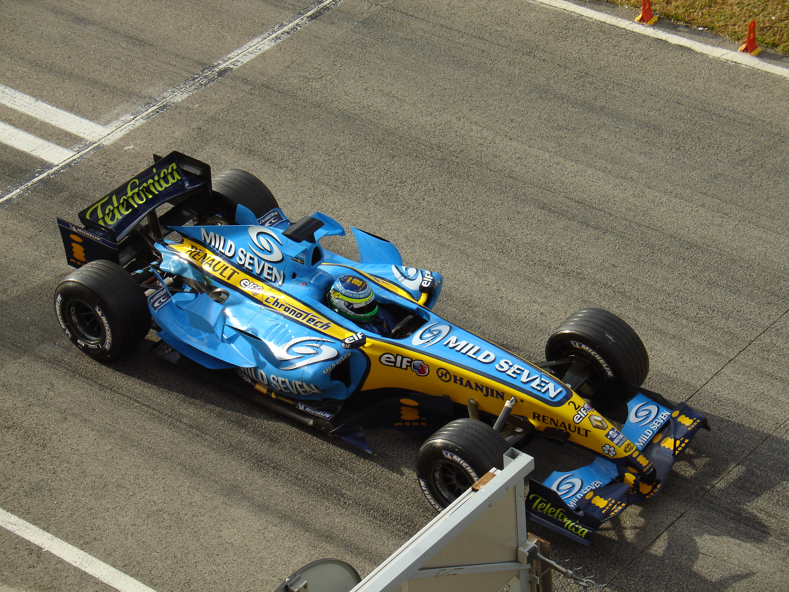 Giancarlo Fisichella at Cheste Circuit (Valencia)